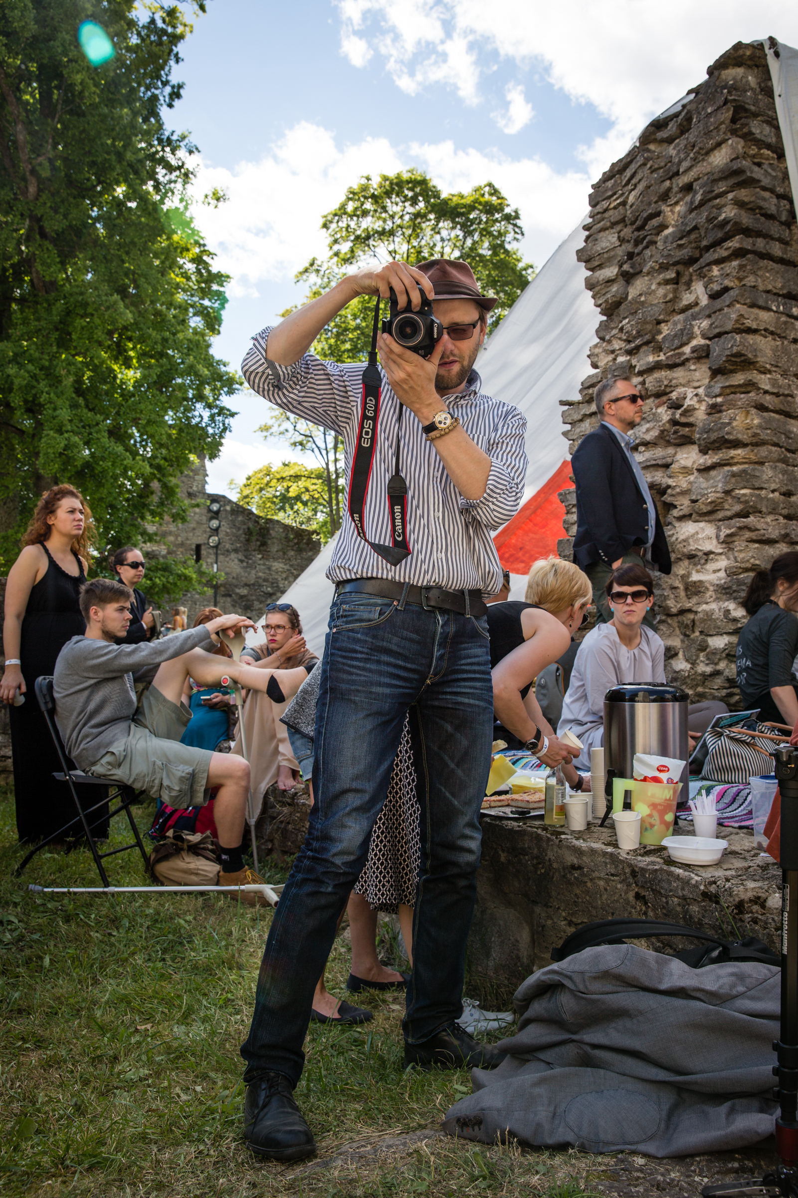 Henri Laupmaa